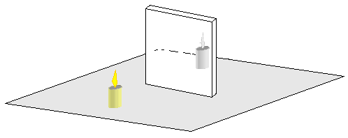 Schéma : expérience des deux bougies (schéma personnel) Catégorie:Schéma de physique